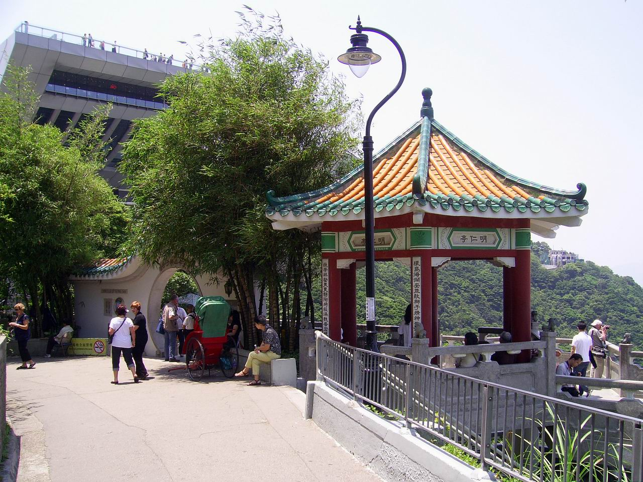 中文（香港）: 太平山狮子亭